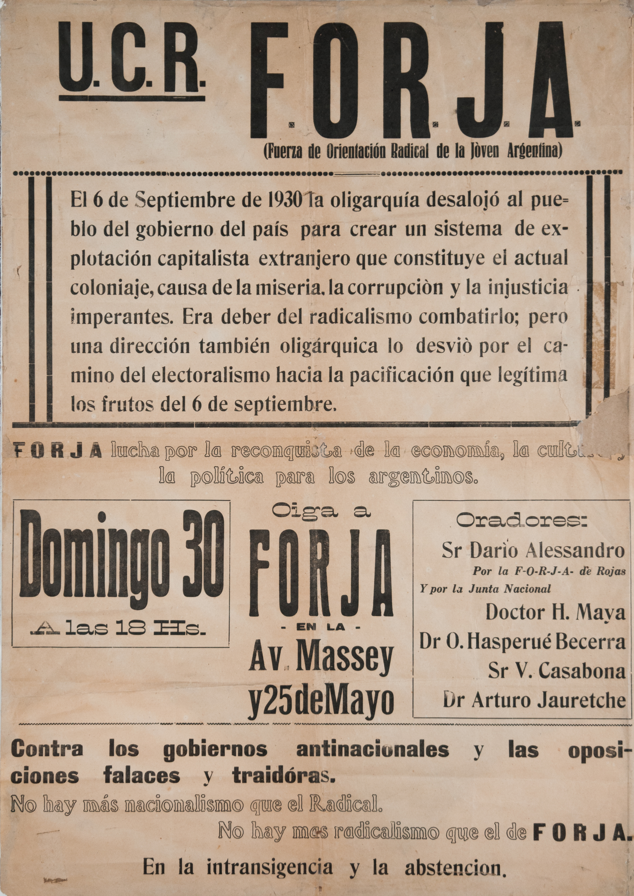 Afiche correspondiente a la Agrupación "F.O.R.J.A.", de la Unión Cívica Radical. En abierta oposición y hostigamiento al golpe de estado del 6 de septiembre de 1930, que derrocó al Presidente Constitucional Hipólito Yrigoyen, la agrupación "Fuerza de Orientación Radical de la Joven Arentina" (F.O.R.J.A.) realizó actos de protesta y fuertes denuncias como las que manifiestan estos afiches suscriptos, entre otros, por Arturo Jauretche, Raúl Scalabrini Ortiz, Luis Dellepiane y Homero Manzi.